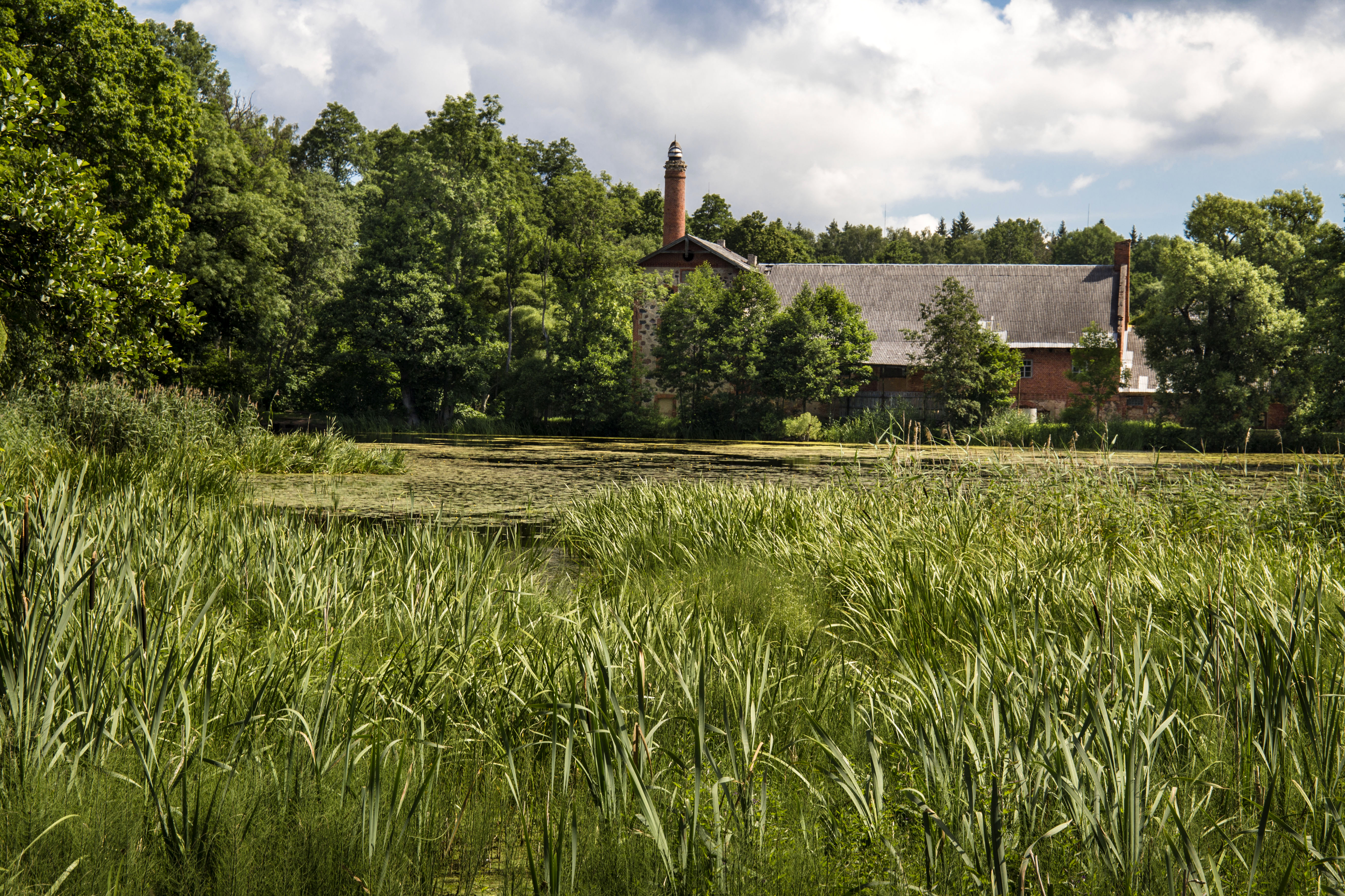 Vandzenes muižas apbūve